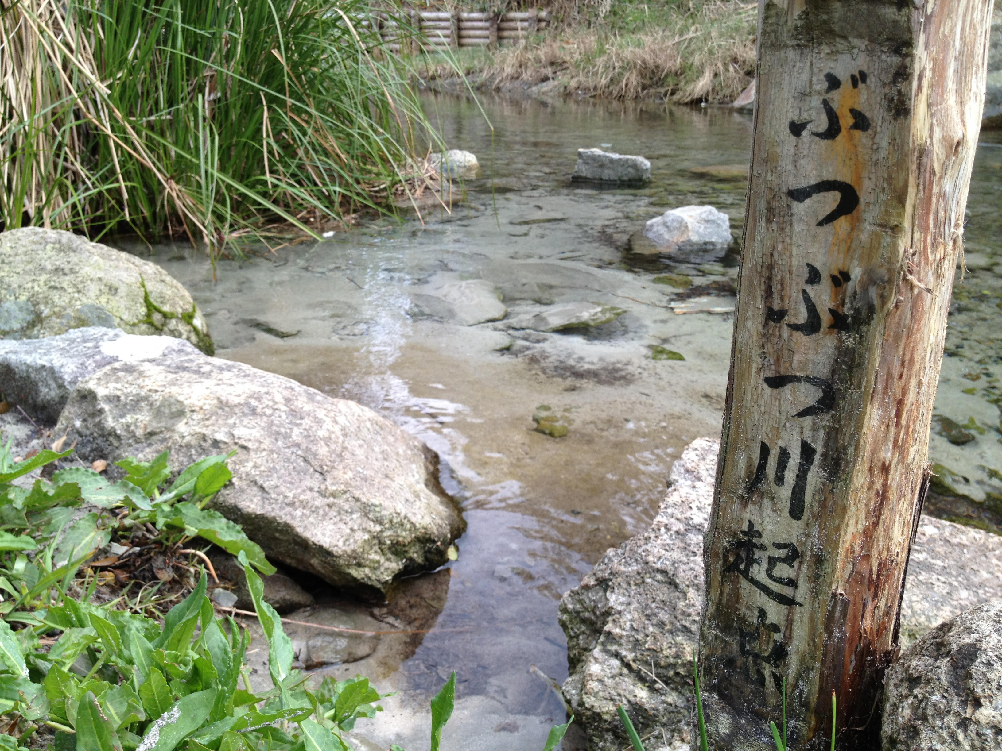 ぶつぶつ川起点